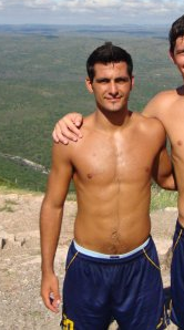 Matías Ballini, futbolista de Rosario Central en 2010 durante una pretemporada.